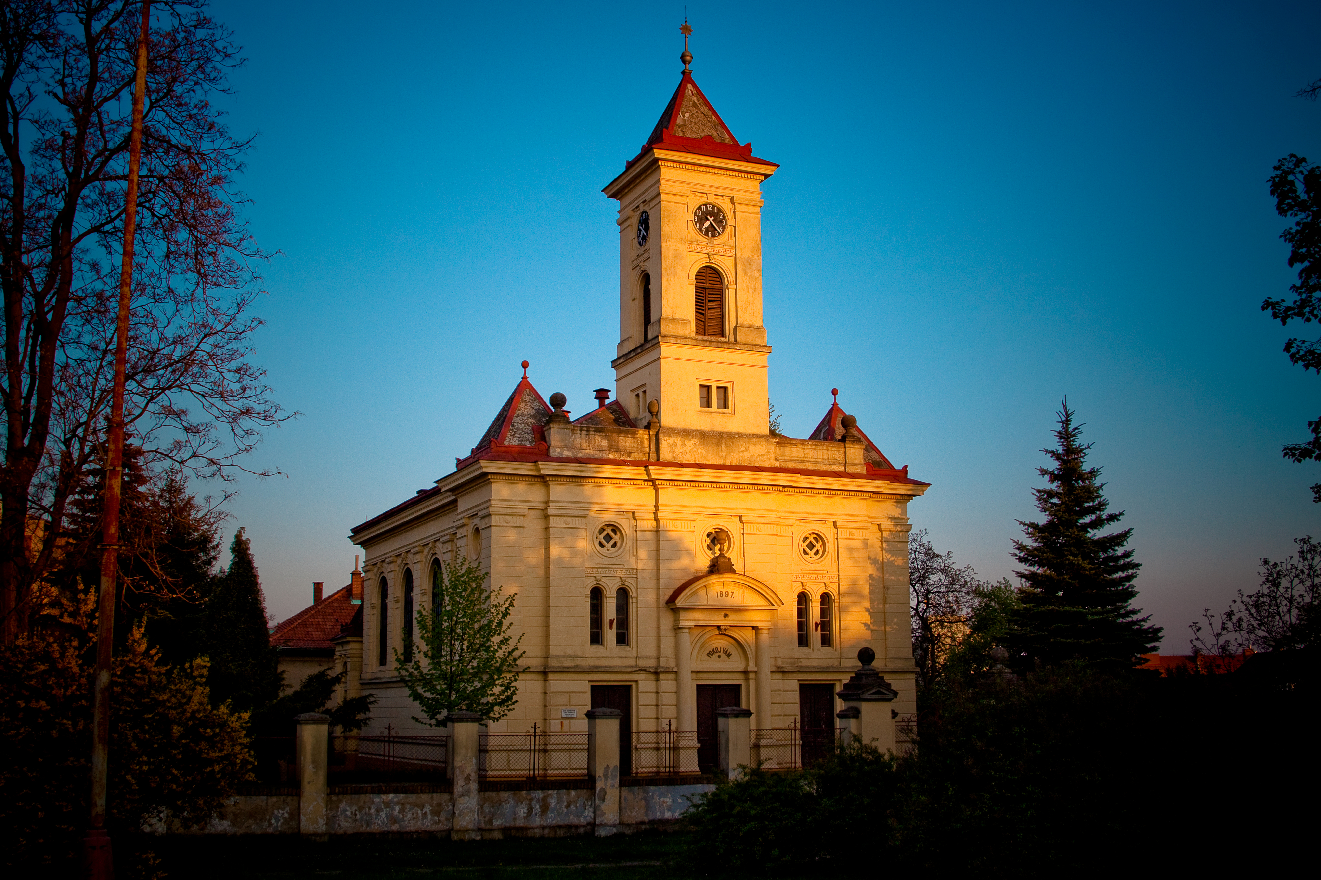 Kostel evangelický, Krombholcova, Mělník